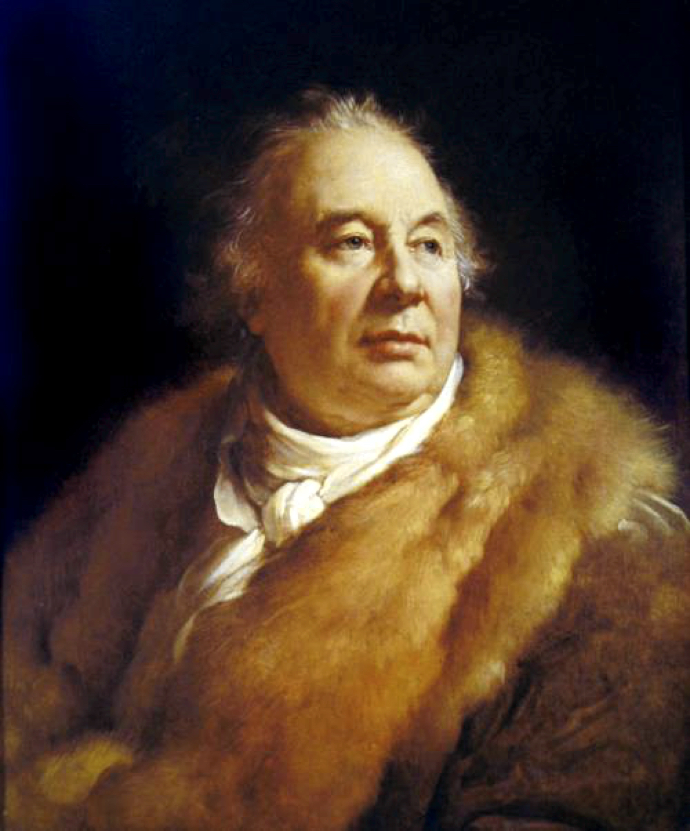 Portrait de Jean-François Ducis, membre de l'Académie Française.